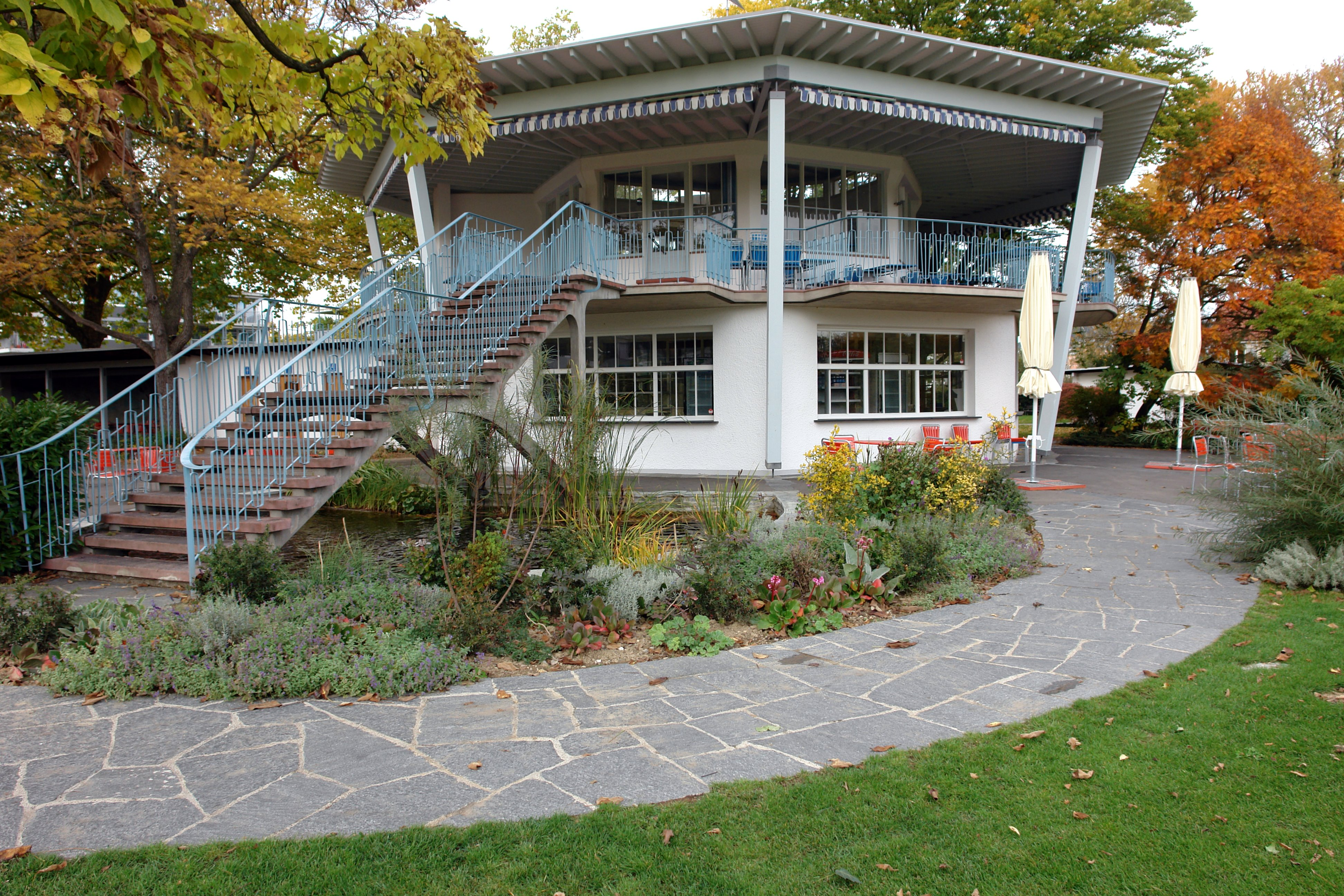 Freibad Letzigraben, Restaurantpavillon, Wettbewerb 1943, errichtet 1947, Architekt: Max Frisch